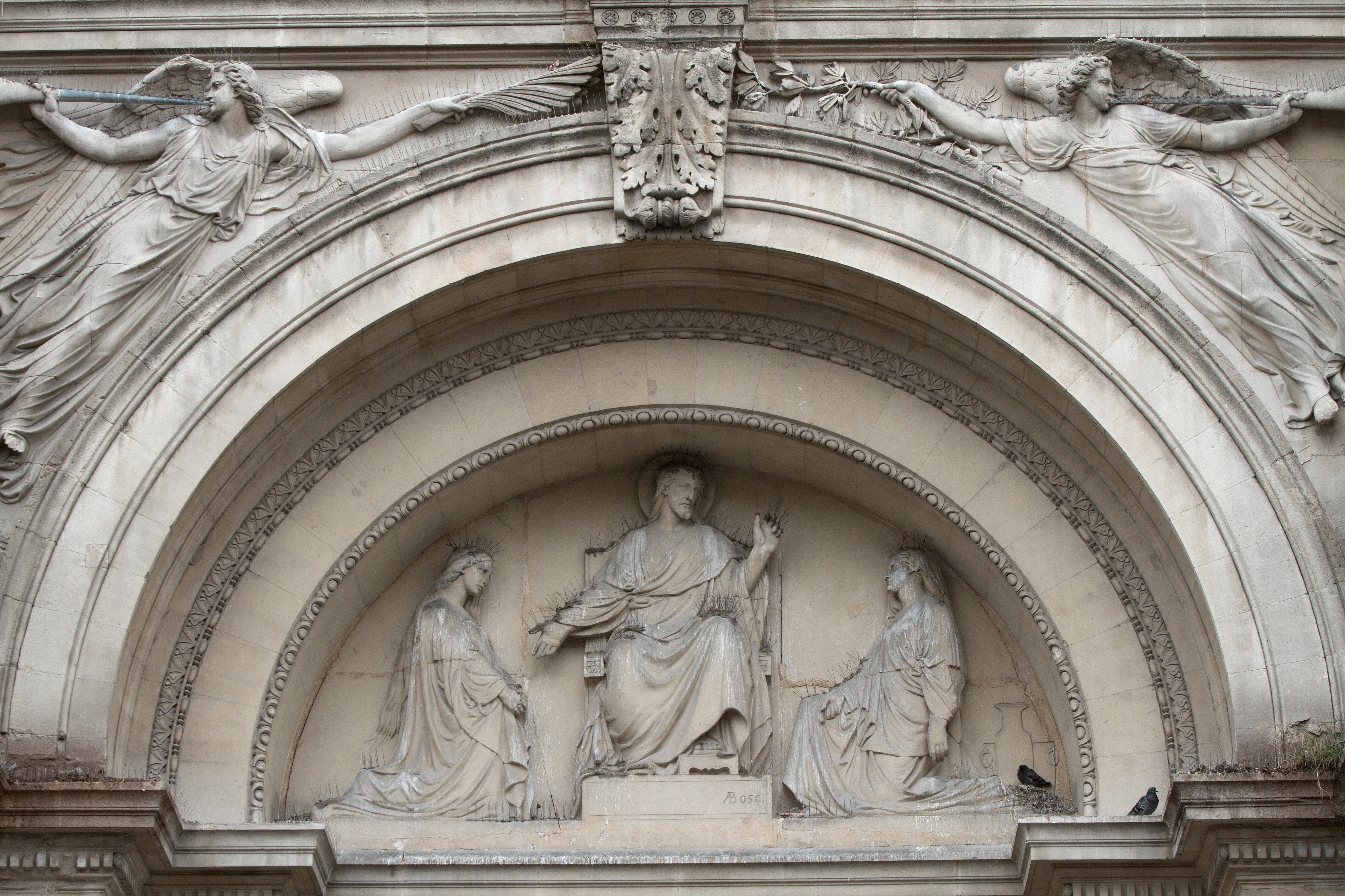 Église de la Madeleine, Aix-en-Provence (France).